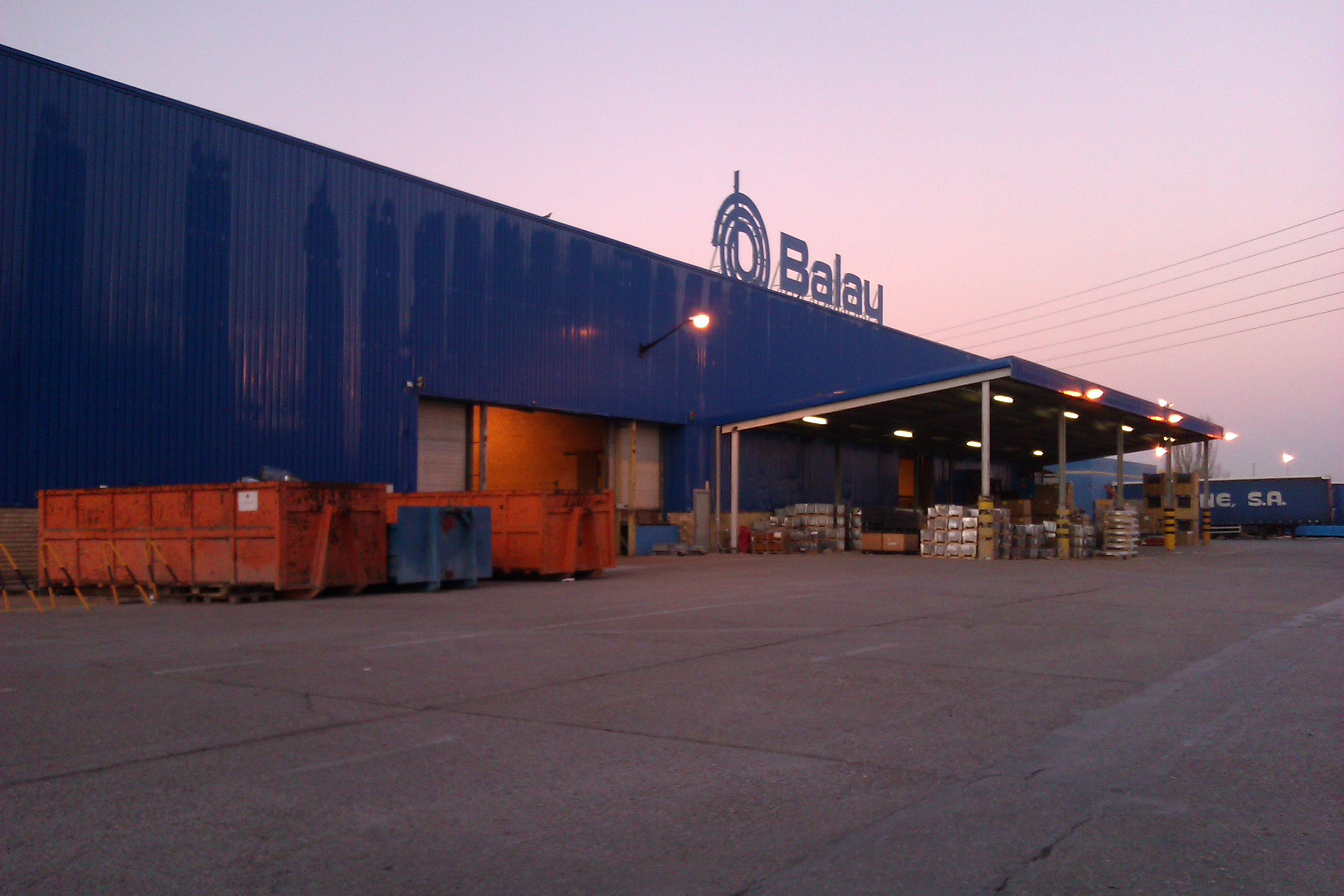 Aragonés: Fabrica de Balay-Montanyana